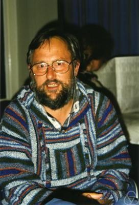 Foto di Gerhard Pfister